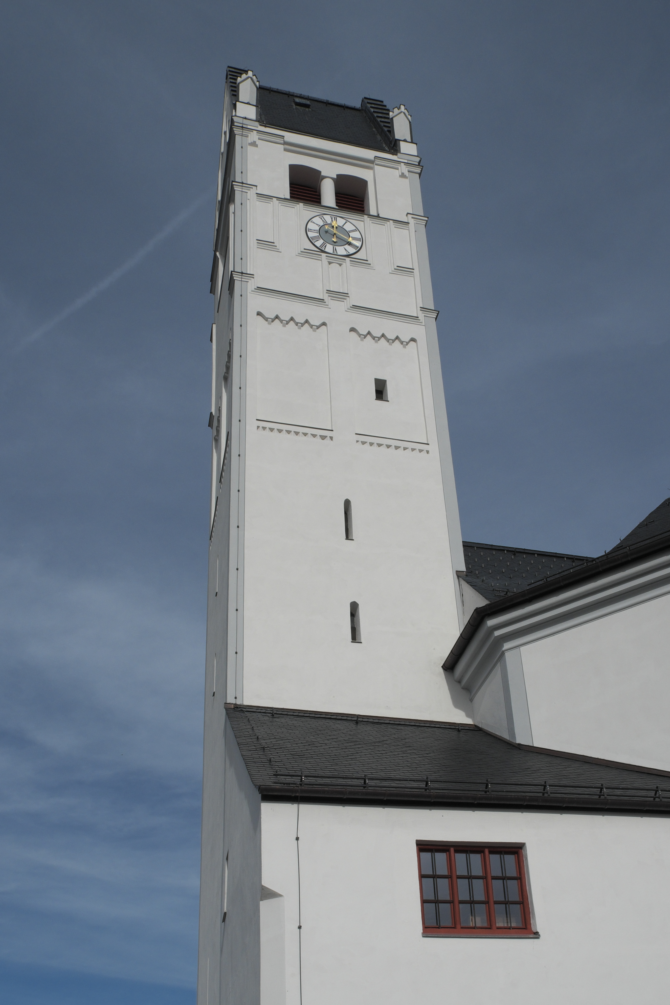 Katholische Pfarrkirche St. Johannes Baptist in Bergkirchen im Landkreis Dachau (Bayern/Deutschland), Glockenturm